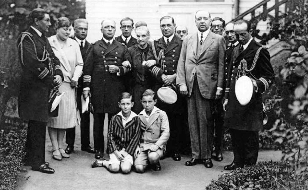 Visita a Carmela Carvajal (al centro) el capitán de navío, Julio Víctor Goicochea Álvarez (a su derecha), comandante de la Escuadra peruana en su primera visita a Chile después de la Guerra del Pacífico. A la izquierda de su madre, de civil, Arturo Prat Carvajal, ca. 1928.